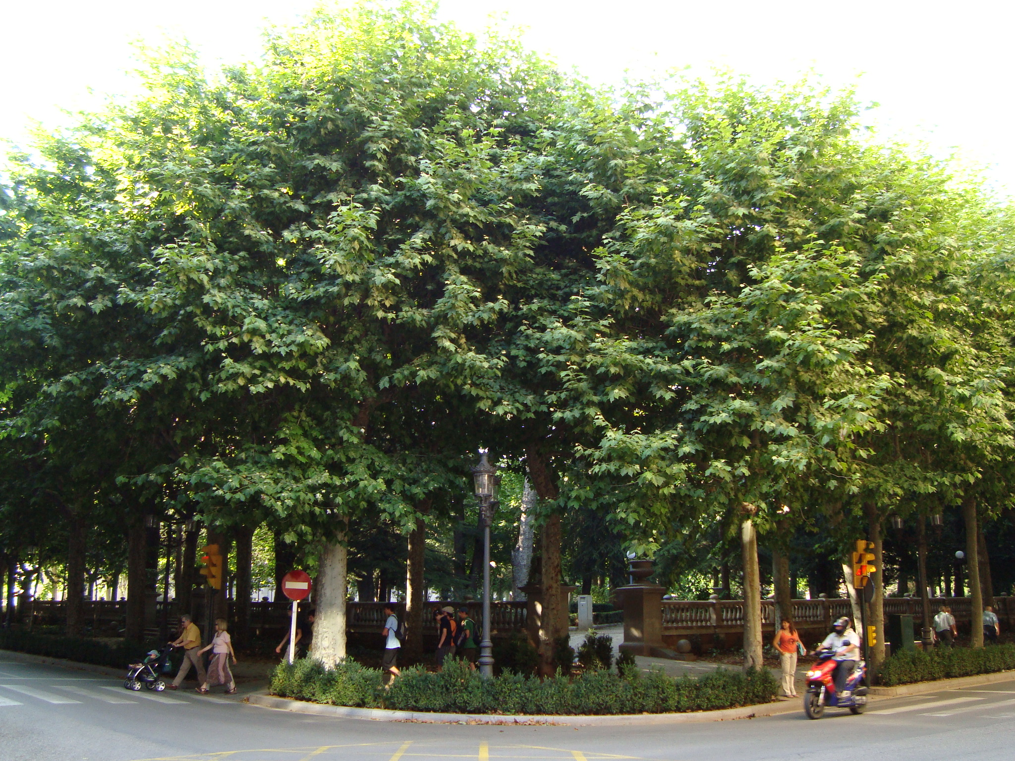 Passeig de Sant Roc